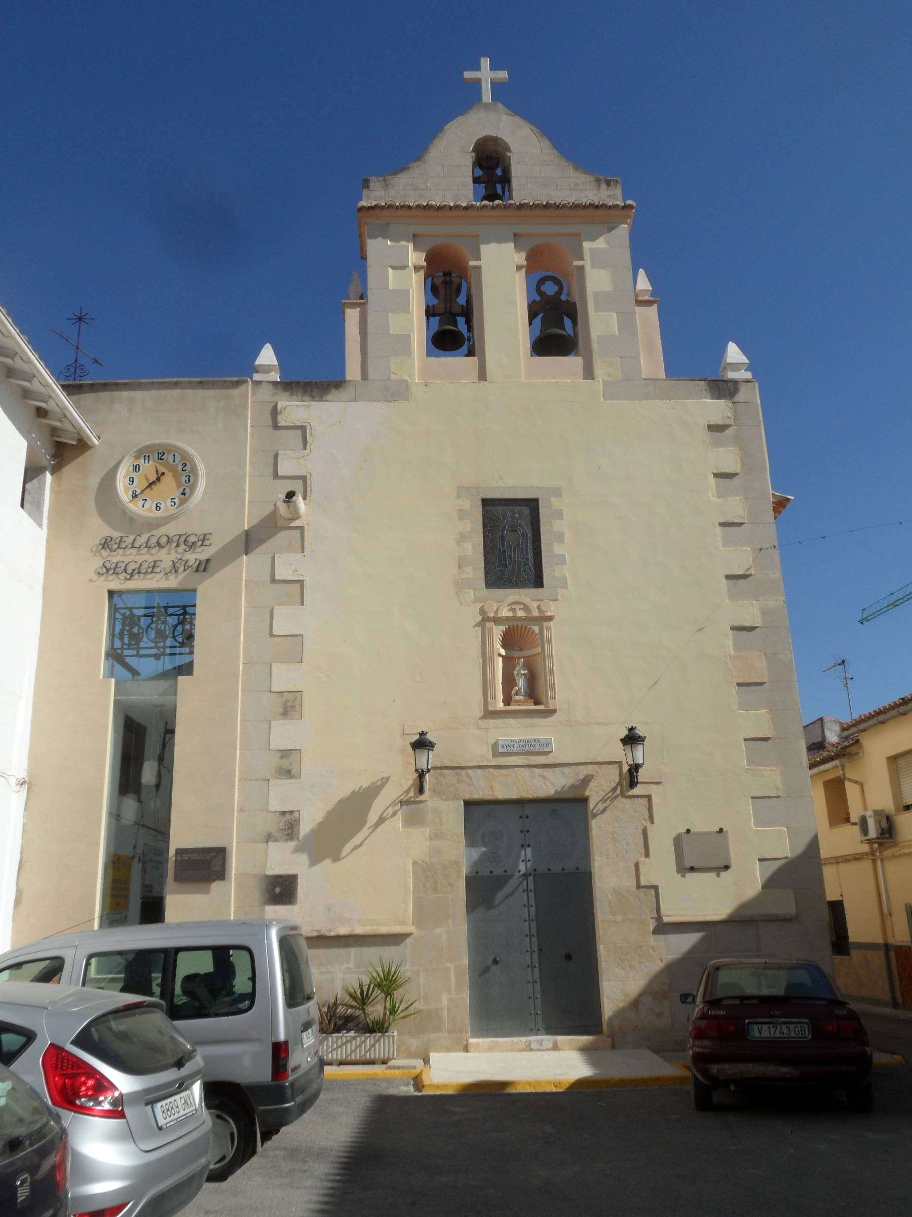 Església de Cerdà. Parròquia de Sant Antoni Abat.